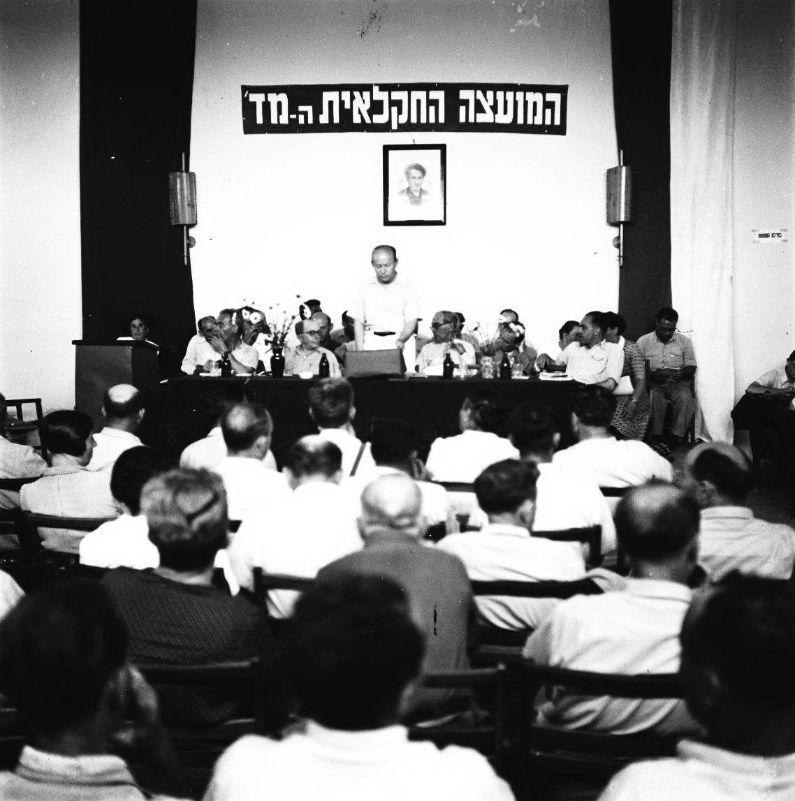 אוסף צילומים של הצלם זולטן קלוגר טווח מספרי התשלילים 18680 - 28184